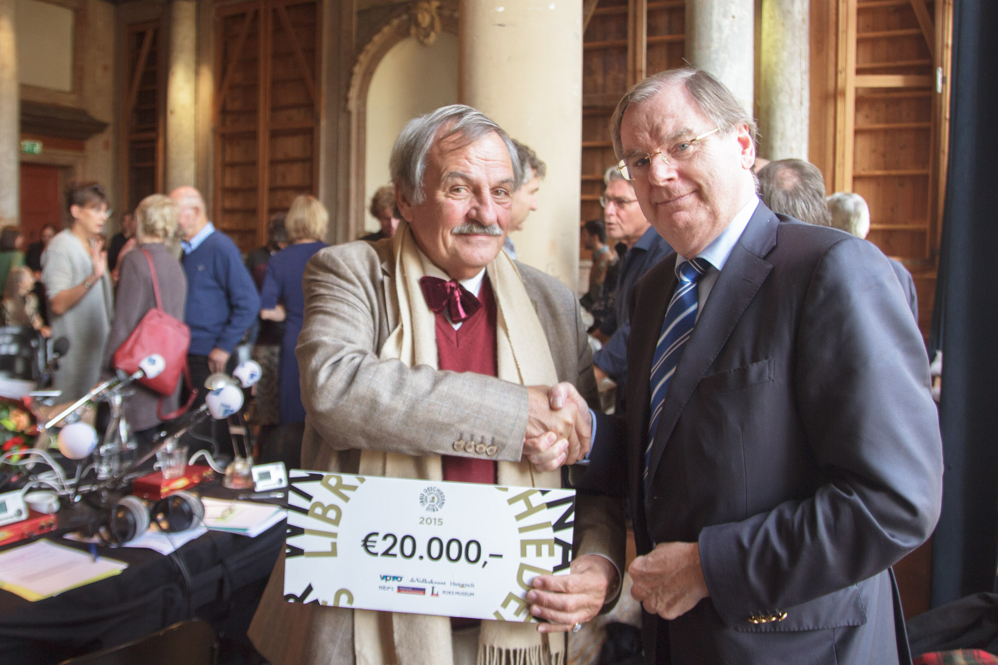 Alexander Münninghoff ontvangt de Libris Geschiedenis Prijs voor zijn boek De stamhouder. Een familiekroniek (Uitgeverij Prometheus - Bert Bakker). Juryvoorzitter Bernard Wientjes overhandigde de prijs voor het beste historische boek van 2015 tijdens een live-uitzending van radioprogramma OVT. De Libris Geschiedenis Prijs maakt onderdeel uit van de Maand van de Geschiedenis. Foto Jan Swienink, 25 oktober 2015 Amsterdam, Felix Meritis.